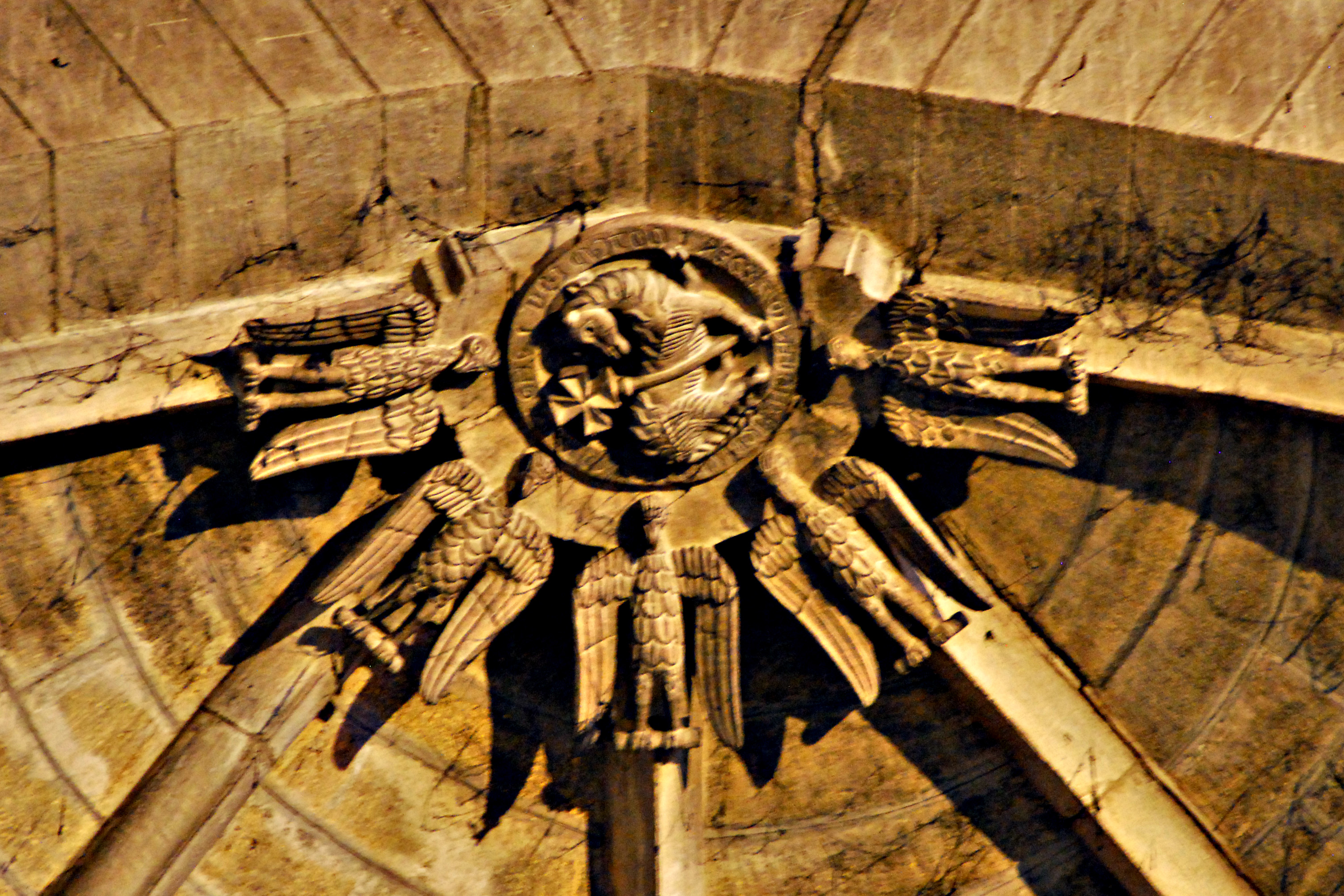 N-D-du-Lac du Le Thor, Gewölbefirst in Chorapsis